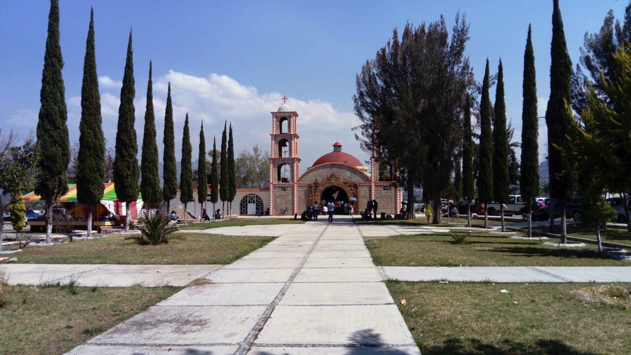 Colonia Cuauhtémoc en Actopan, Hidalgo, México.